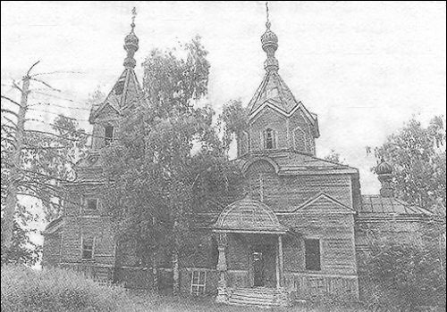 Свята-Ільінская царква ў Бабруйску (раней - в. Куляшоўка Клімавіцкага раёна)